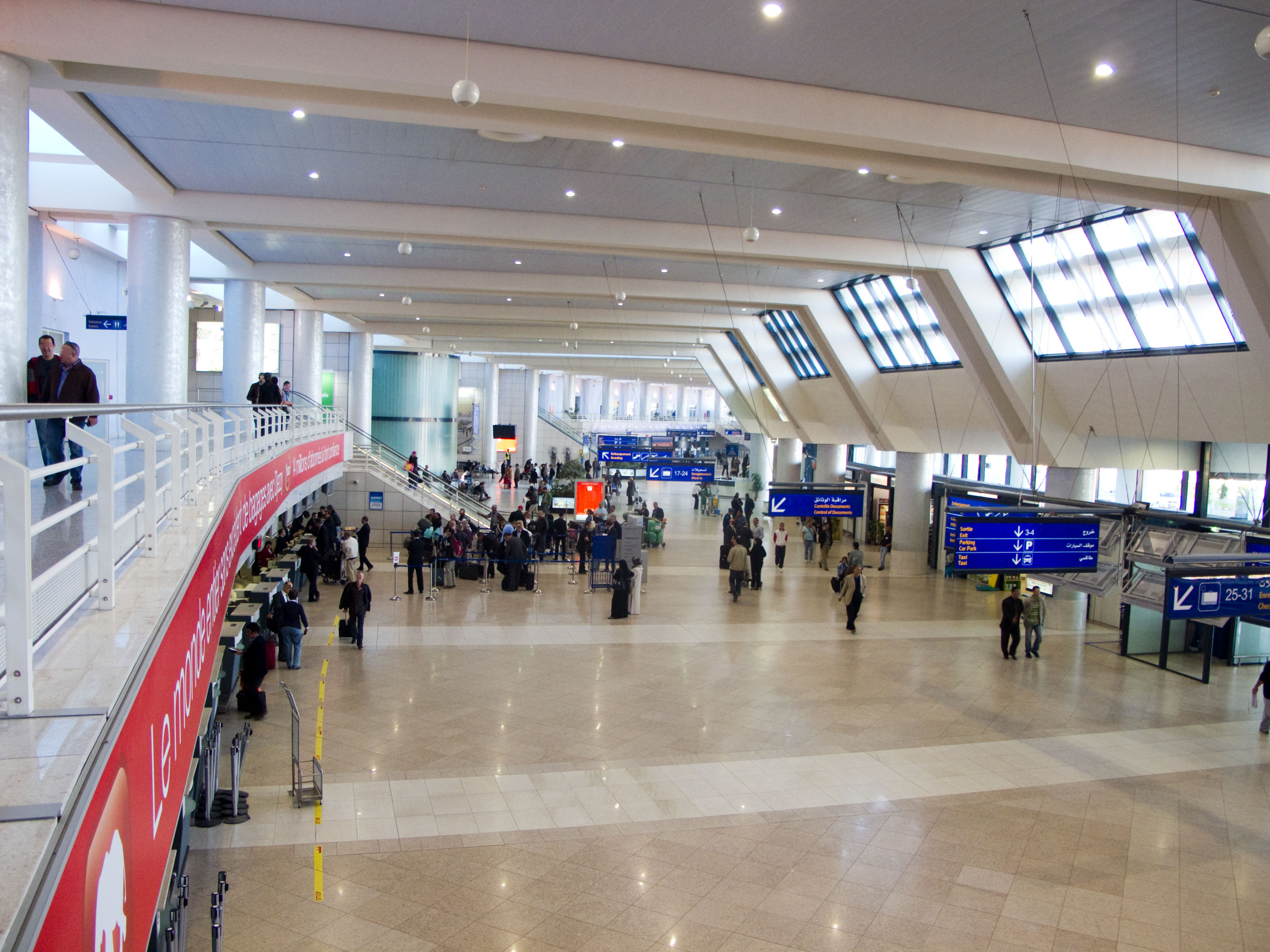 Aéroport Houari Boumediene, Dar El Beida, Alger, Algérie (nouvel aérogare, hall de départ)